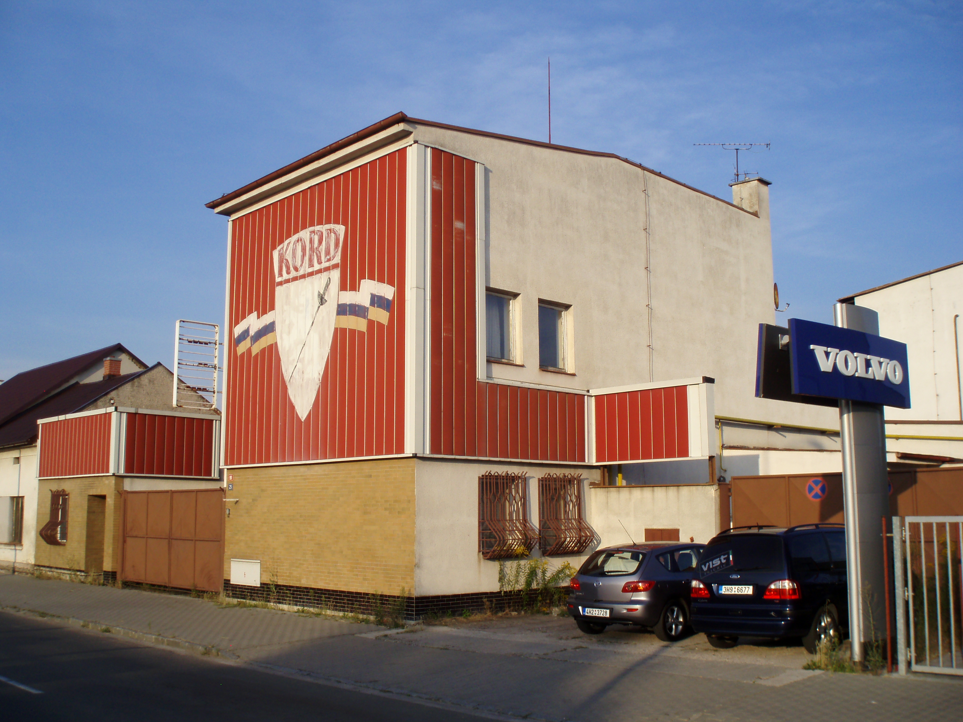 Továrna na lihoviny Kord (dnes již neexistuje), Pardubická 99/29, Hradec Králové-Kukleny.